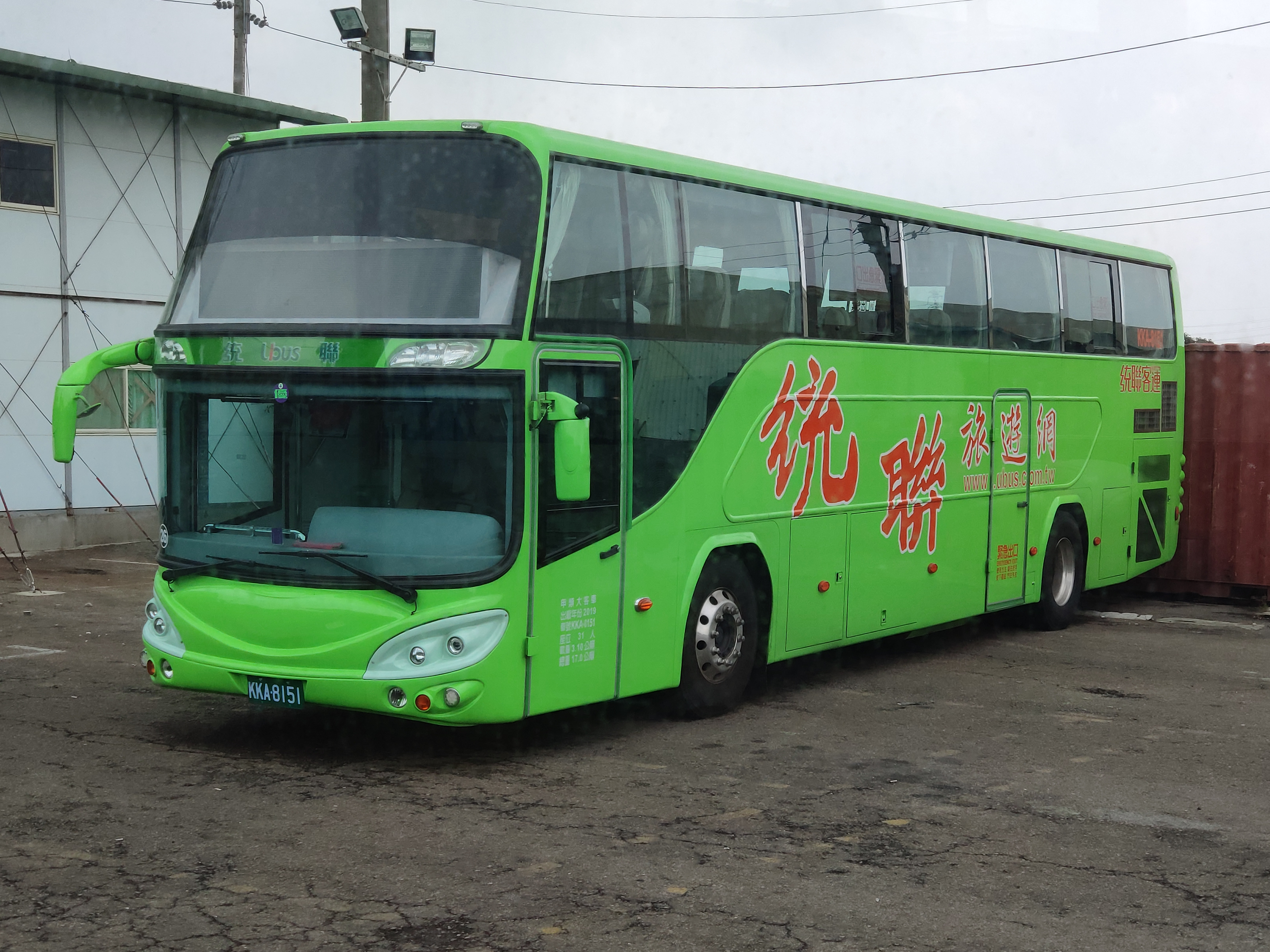 中文（台灣）: 統聯客運SCANIA K400IB4X2NB大客車 KKA8151